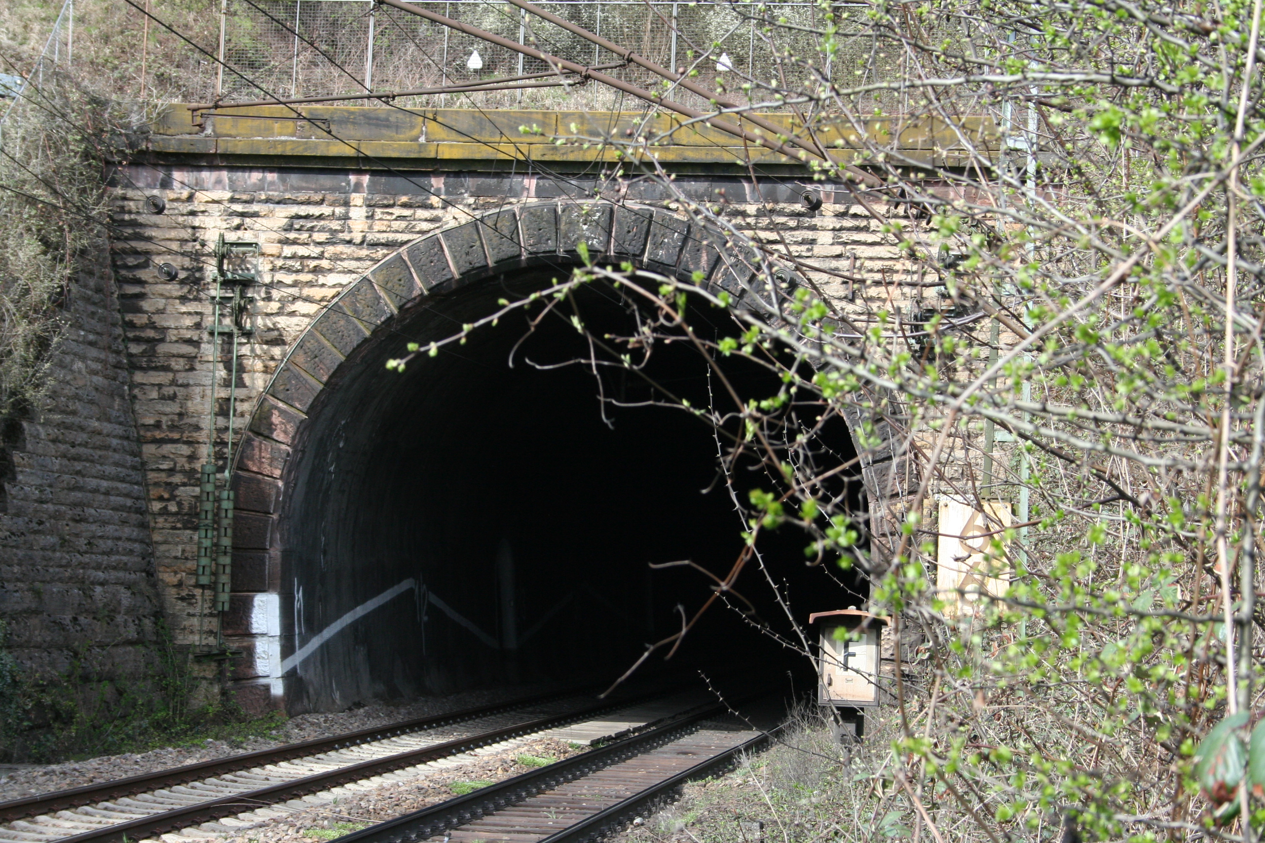 Schnarrenbergtunnel, Tunnelportal auf Seite des Stadtbezirks Stuttgart-Münster